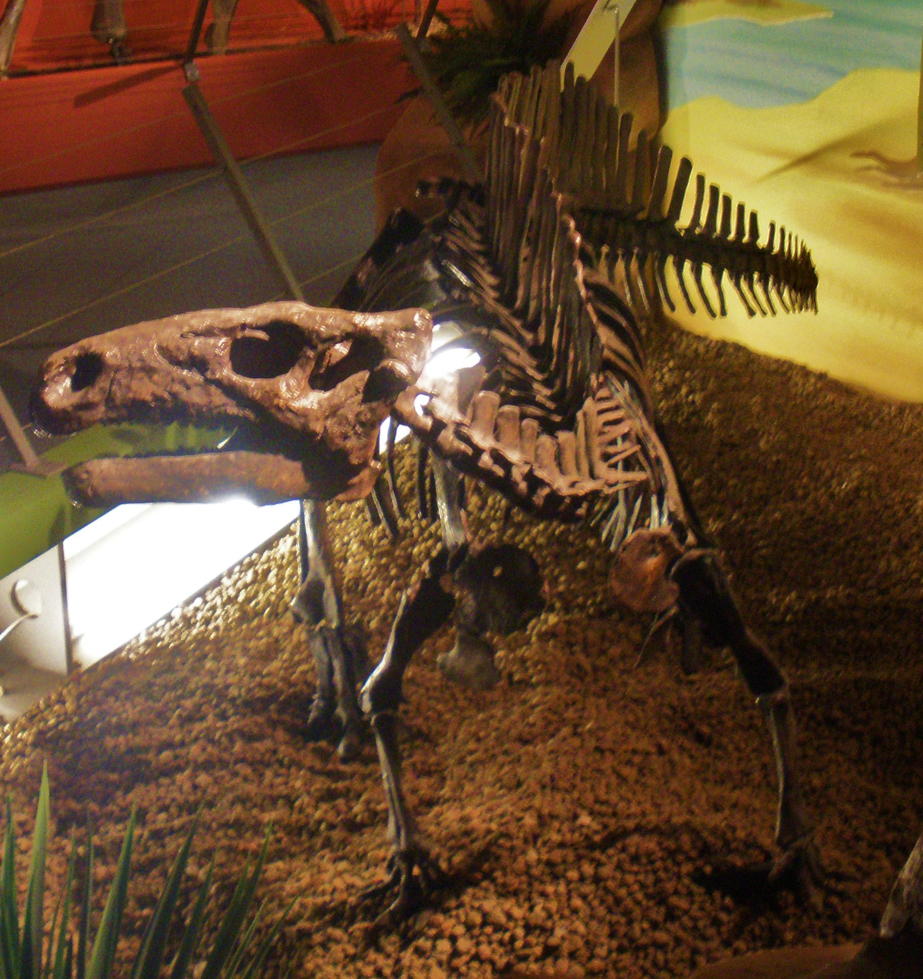 fossil Rhabdodon